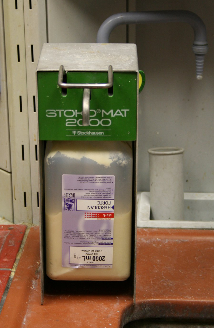 Handwaschpasten-Spender